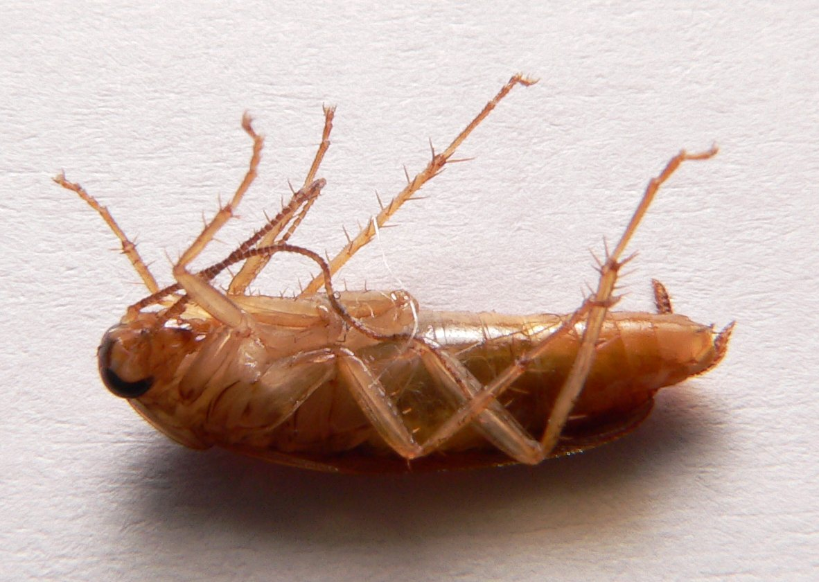 Blatella germanica